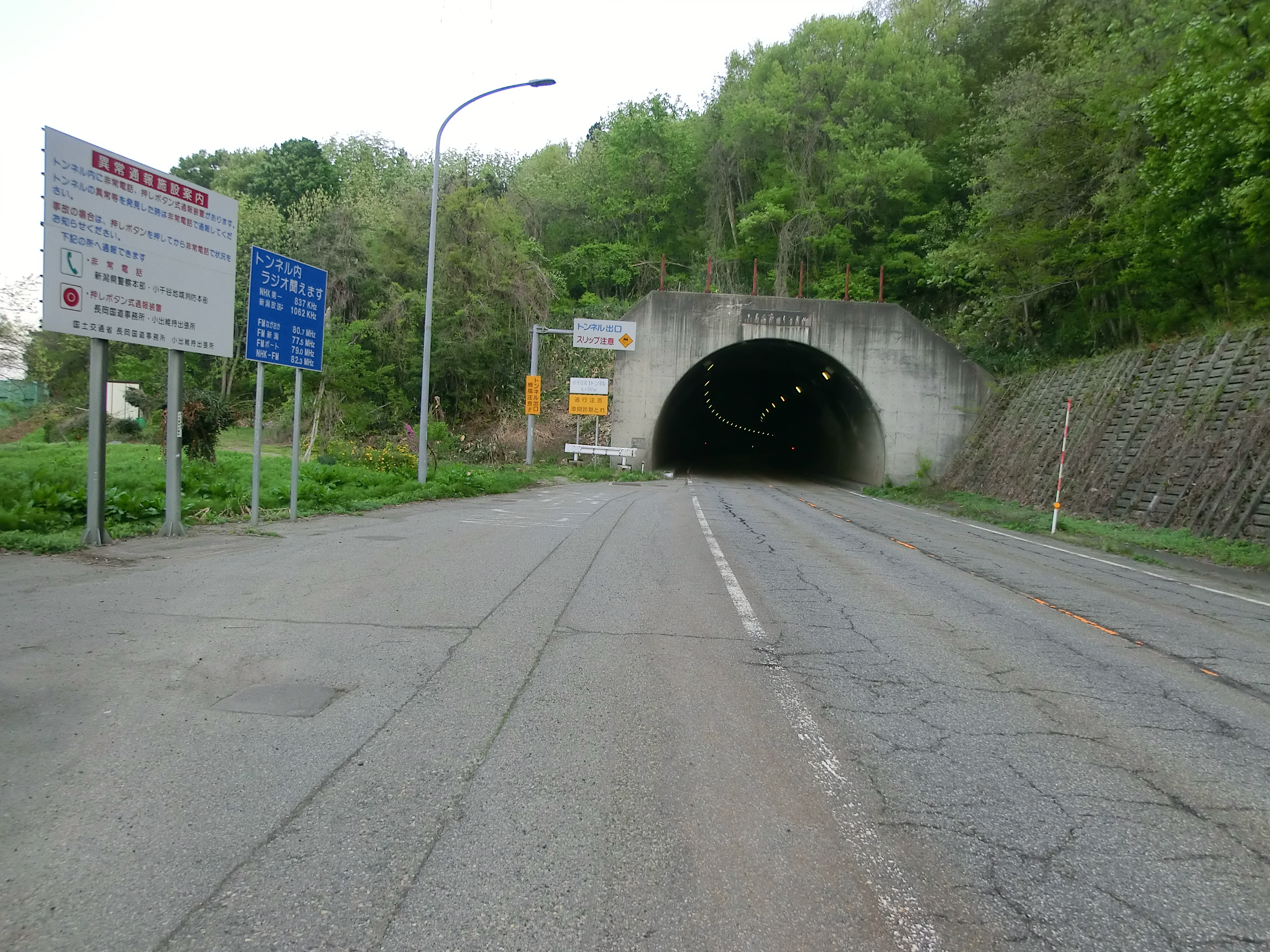 この画像は2018年4月29日投稿者によって新潟県小千谷市にて撮影された、国道17号線小千谷バイパス小千谷第1トンネル入口（東京側）と、周辺の道路標識を撮影した写真。